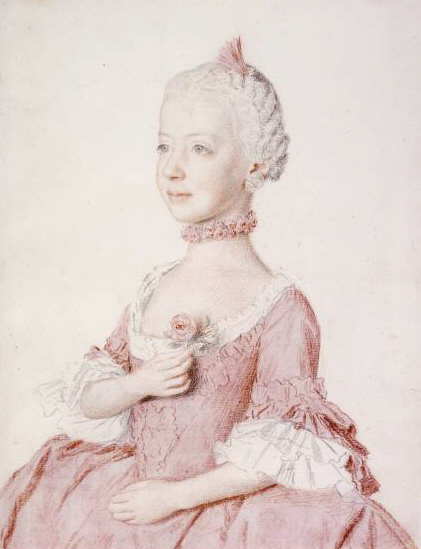 Maria Karolina (Marie Karoline) von Österreich als Kind